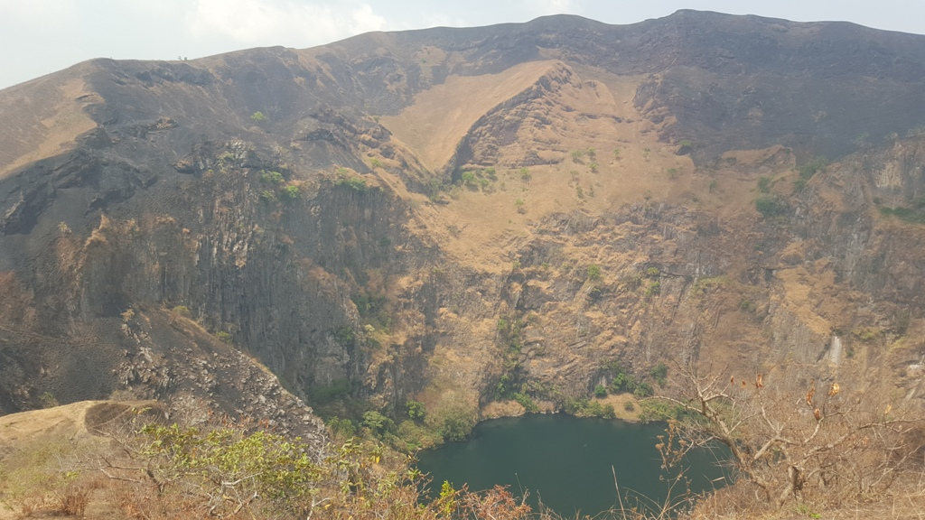 Lake Mfou is located on Mt Mbapit which is located in Foumbot, Noun division of the west region of Cameroon.